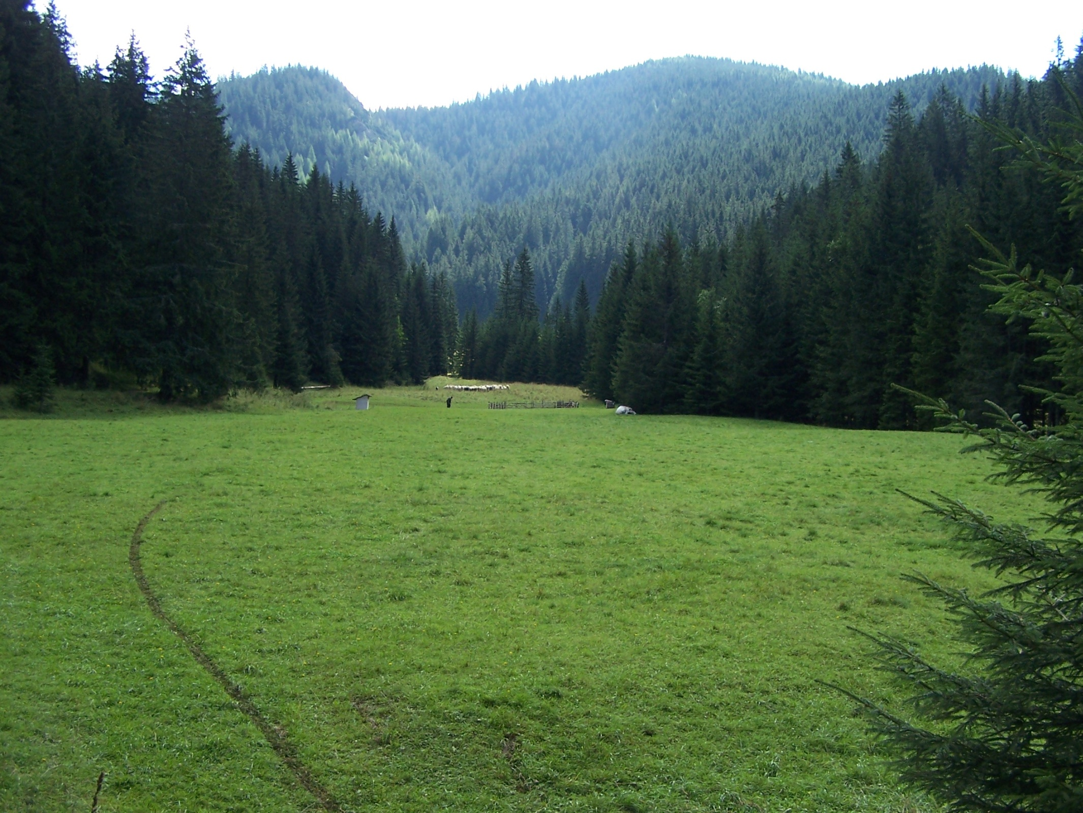 Polana Huciska na Dolinie Chochołowskiej w Tatrach. Wypas kulturowy